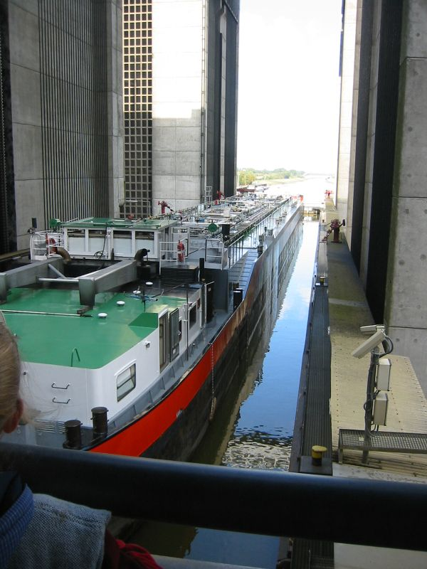 Schiffshebewerk in Scharnebeck eigene Aufnahme 19.09.2004